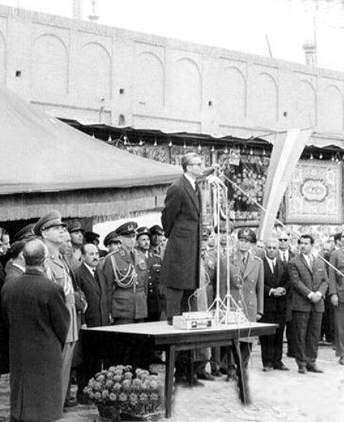 Discours du Shah à Qom, en réponse à l'hostilité de la ville suite au lancement annoncé de la Révolution Blanche